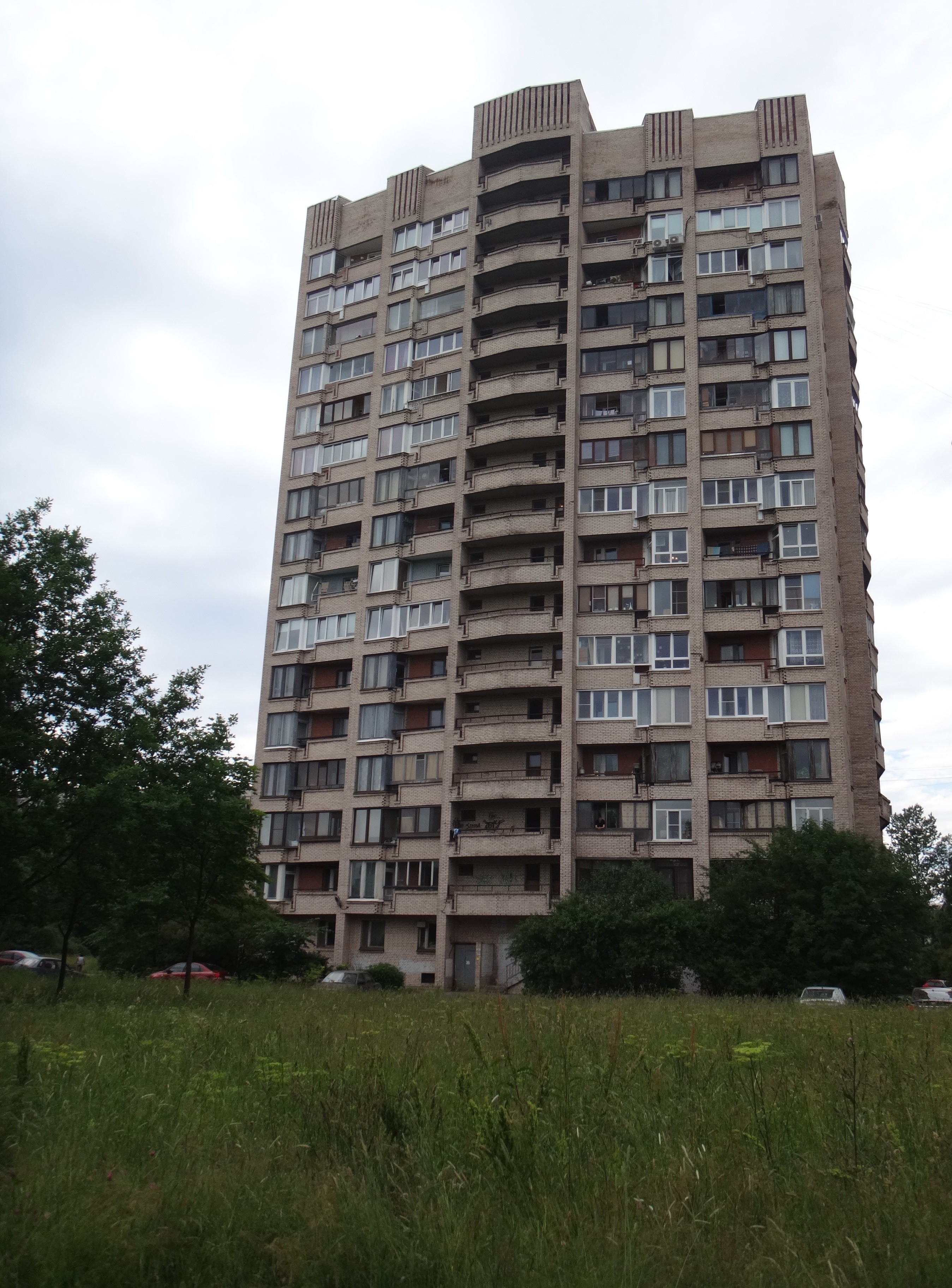 Дом типа 1-528кп82